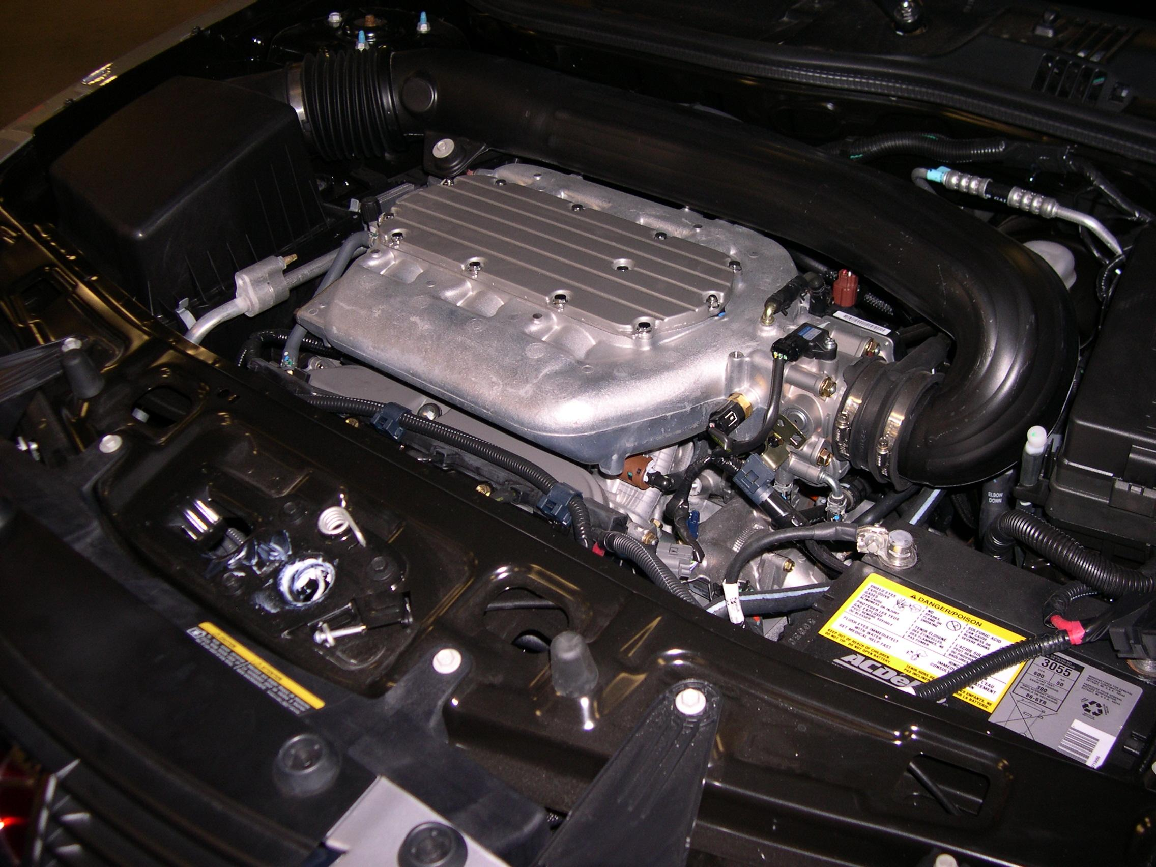 2006 Saturn VUE Honda/GM L66 V6 engine